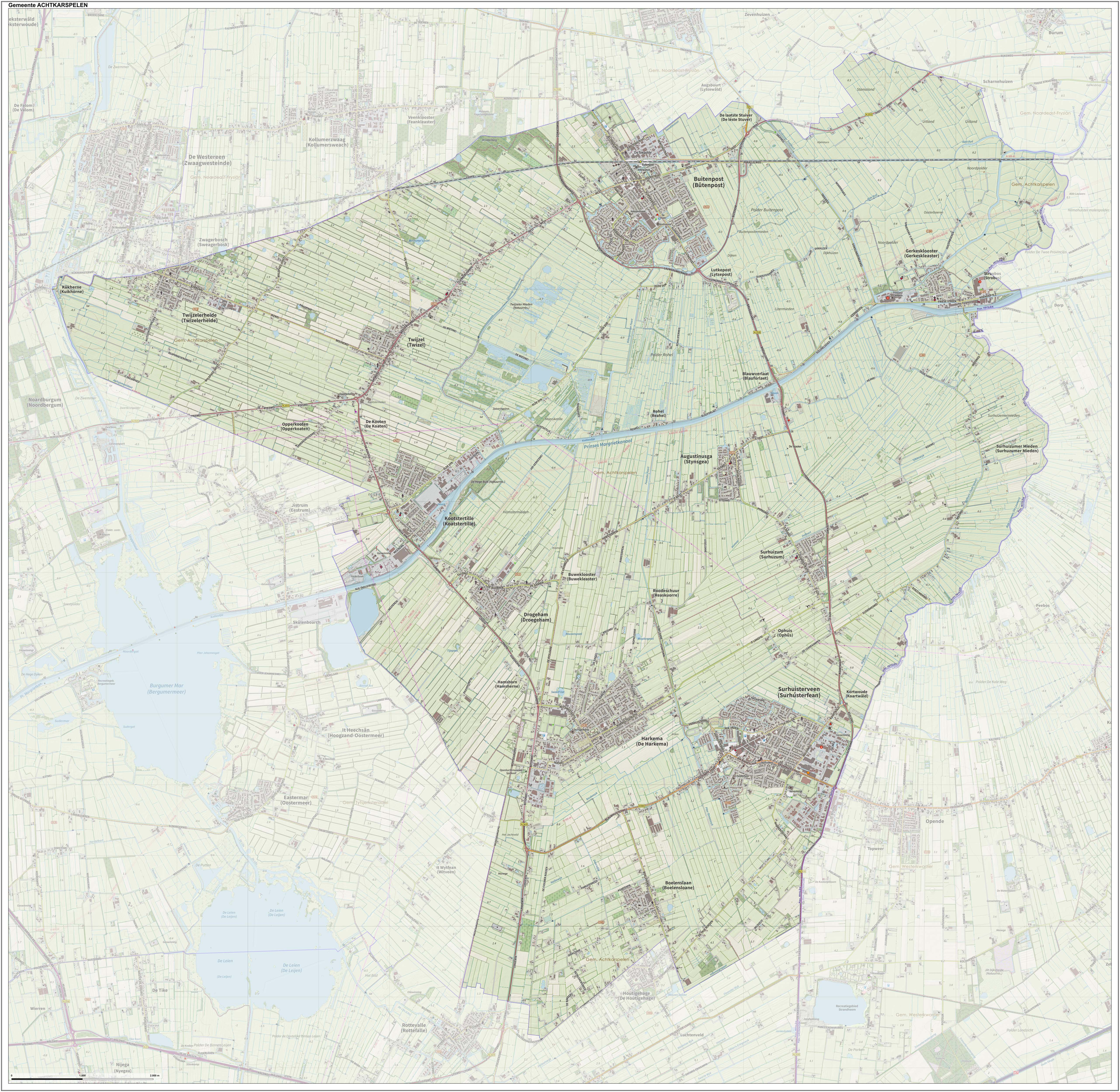 Topografische gemeentekaart. Resolutie: 400 pixels/km. Kaartbeeld samengesteld uit de open geodata van de Top10NL en Top25namen (Kadaster), Creative Commons-BY licentie. Gebouwvlakken uit open geodata BAG extract. Wegen uit de OpenStreetMap, OpenStreetMap community. Reliëfschaduw uit de Actuele Hoogtekaart AHN2. Samenstelling en kleurenschema: Jan-Willem van Aalst, met QGIS. Zie ook de Legenda.